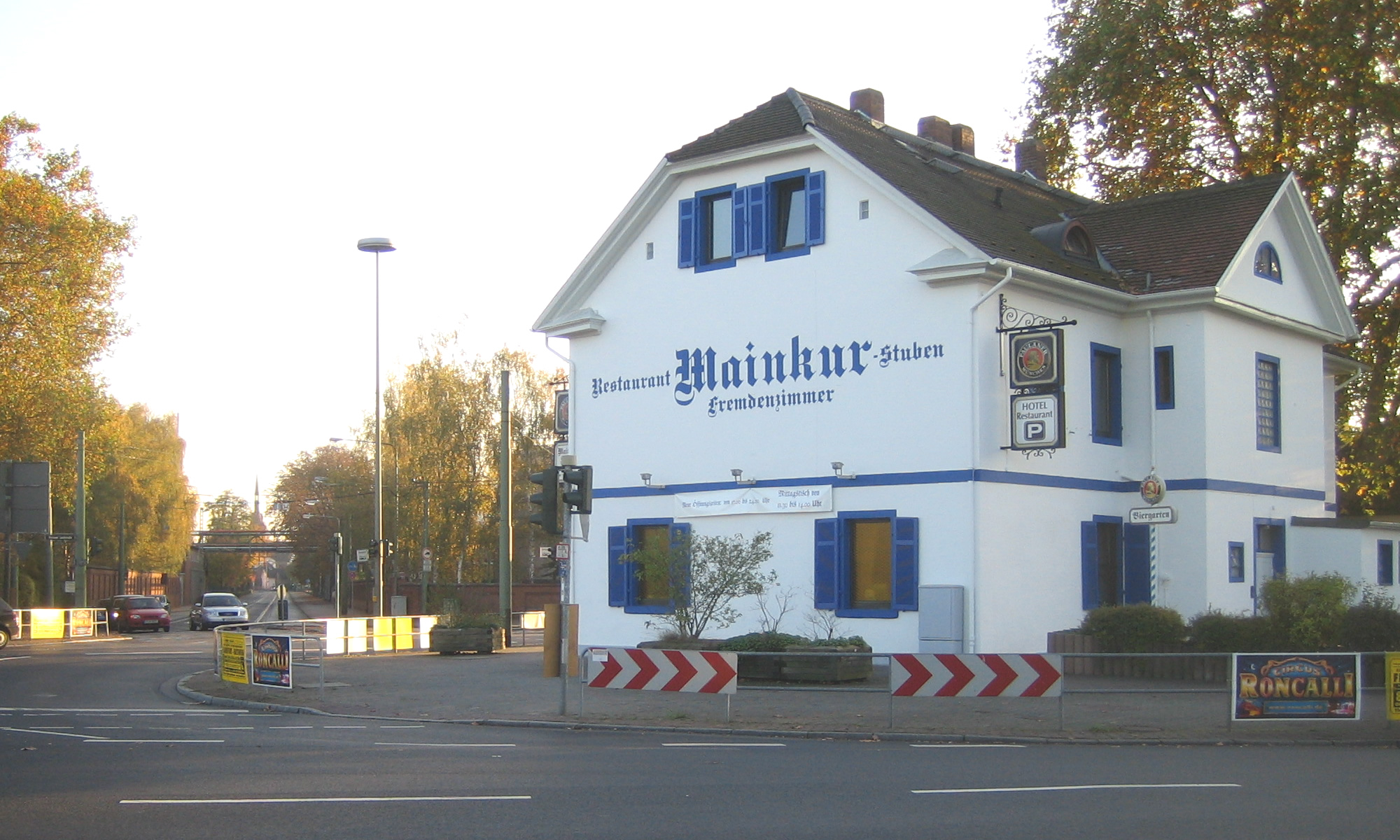 Gasthaus Mainkur-Stuben, Hanauer Landstraße, Frankfurt-Fechenheim